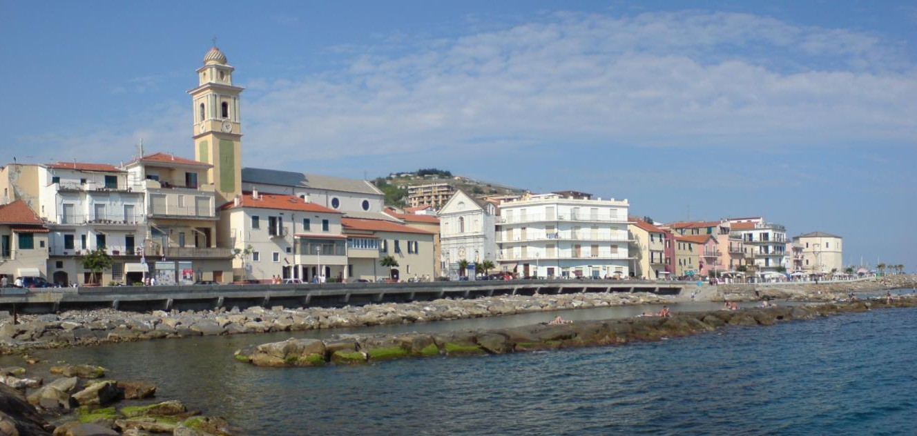 Parte storica di Santo Stefano al Mare (IM) visto da un molo